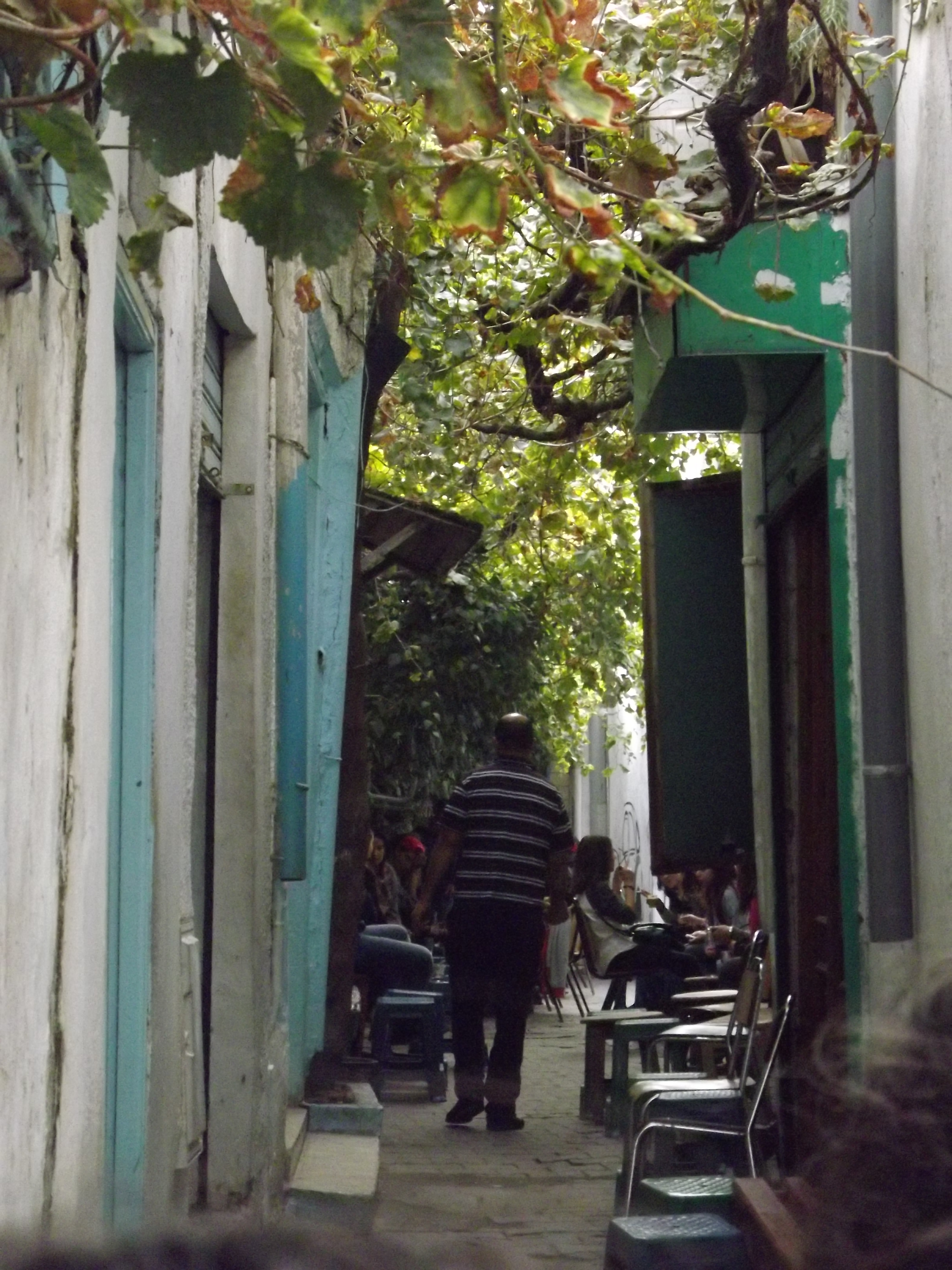 Café el enba situé au souk el rbaa